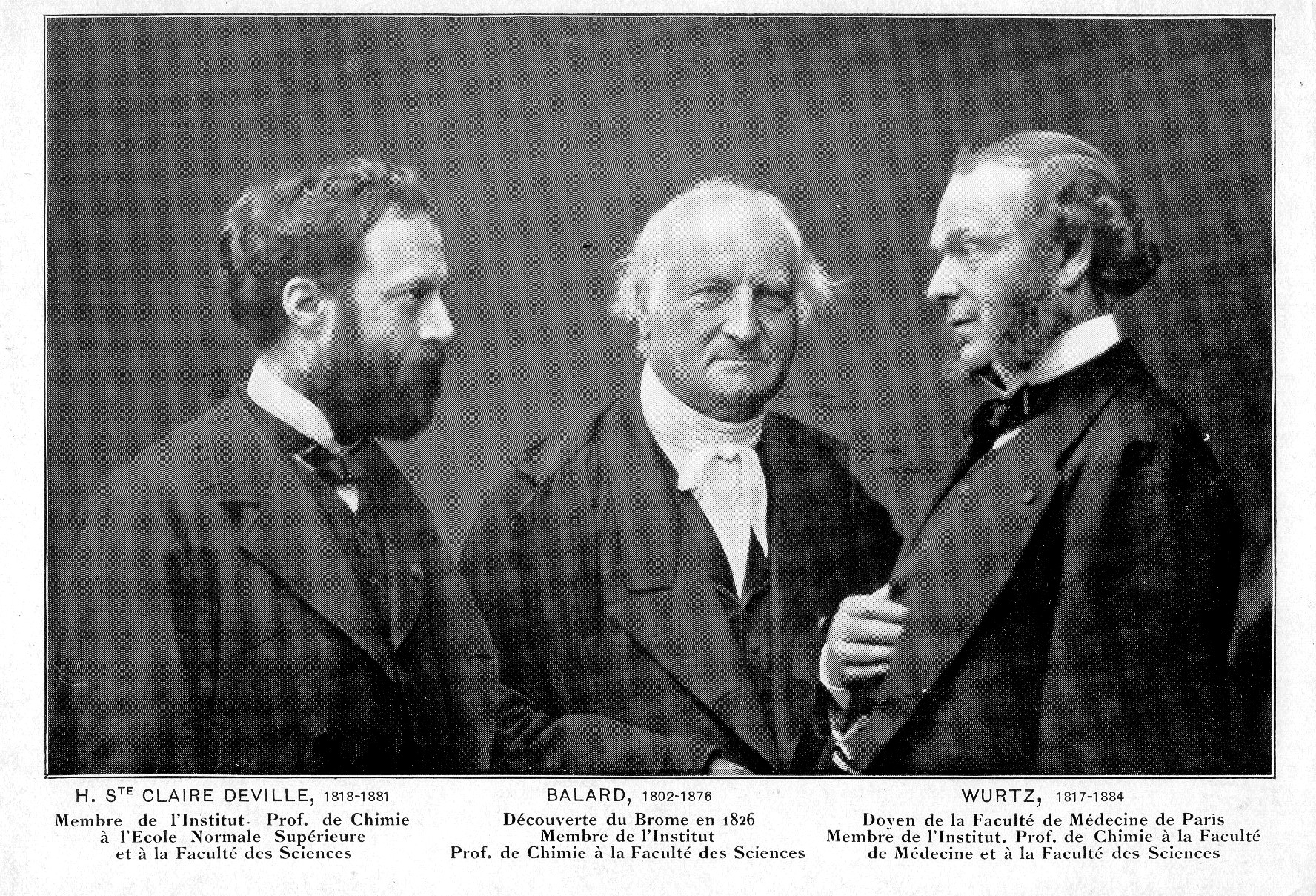 Foto di Claire Deville (1818-1881), Antoine Jérôme Balard (1802-1876) e Charles-Adolphe Wurtz (1817-1884), docenti di chimica presso l'Ecole Normale Superieure di Parigi.